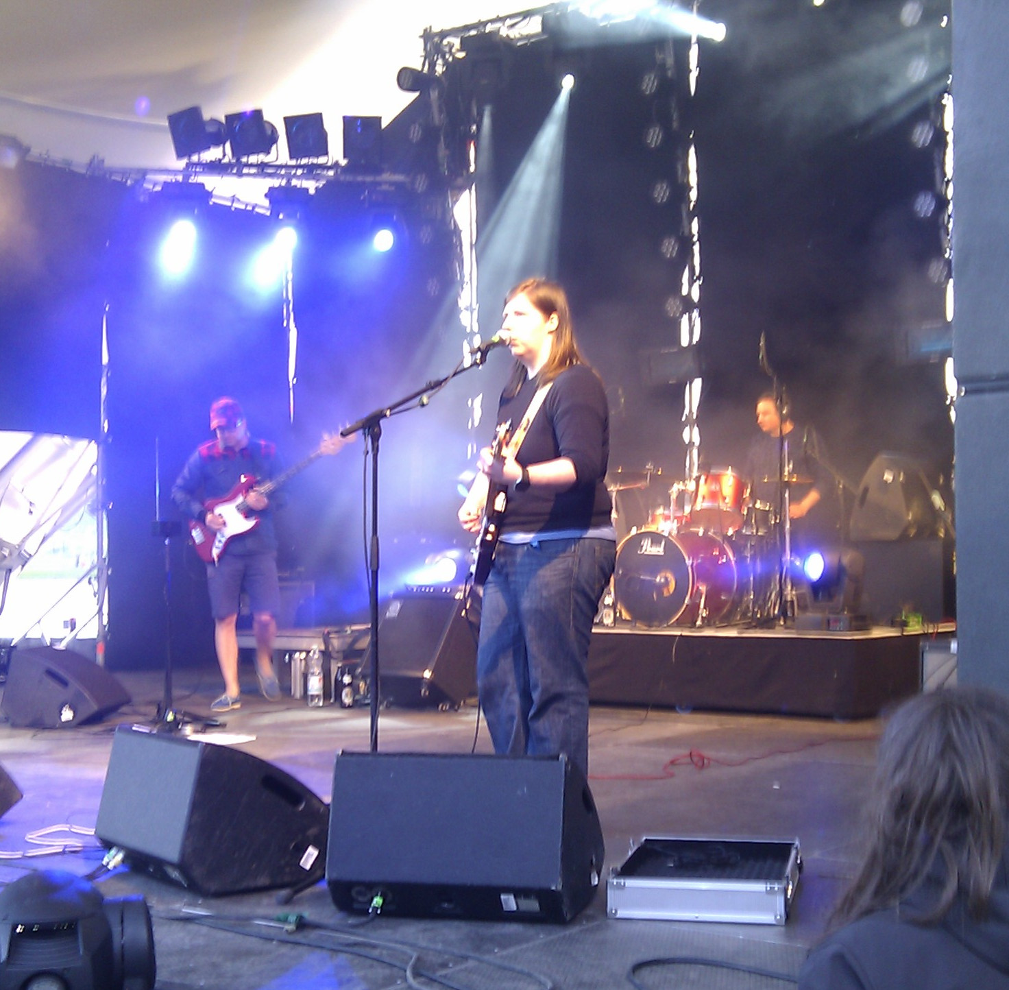 Karo & Jets vs. Sharks (Karoline Schaum mit Band) aus Würzuburg beim Pfingsttheatron 2013, München